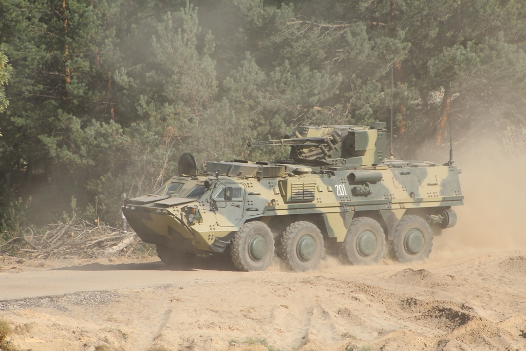 На Гончарівському загальновійськовому полігоні завершилися навчальні збори з особовим складом оперативного резерву, який було залучено до проведення тактичних навчань однієї з механізованих бригад. 620 резервістів відпрацювати дії бригади у обороні та наступі із бойовою стрільбою та залученням авіації. Два тижні військовослужбовці вдосконалювали свої навички та набували нового досвіду, або опановували нові військові спеціальності та новітні зразки озброєнні і військової техніки. Варто зазначити, що резервісти не тільки поповнювали свій багаж знань та вмінь, а й ділилися власним досвідом, адже переважна більшість резервістів має унікальний бойовий досвід, набутий у зоні проведення антитерористичної операції. Із завершенням зборів резервістів привітав начальник штабу – заступник командувача військ оперативного командування «Схід» генерал-майор Олександр Красноок, який здійснював загальне керівництво бригадними тактичними навчаннями. Він подякував резервістам за проведену роботу у складі механізованої бригади та вручив особовому складу бригади відзнаки, цінні подарунки та подяки начальника Генерального штабу, командування Сухопутних військ та оперативного командування «Схід». Всі 620 резервістів вже сьогодні відправляться додому. Фото Євген Романов